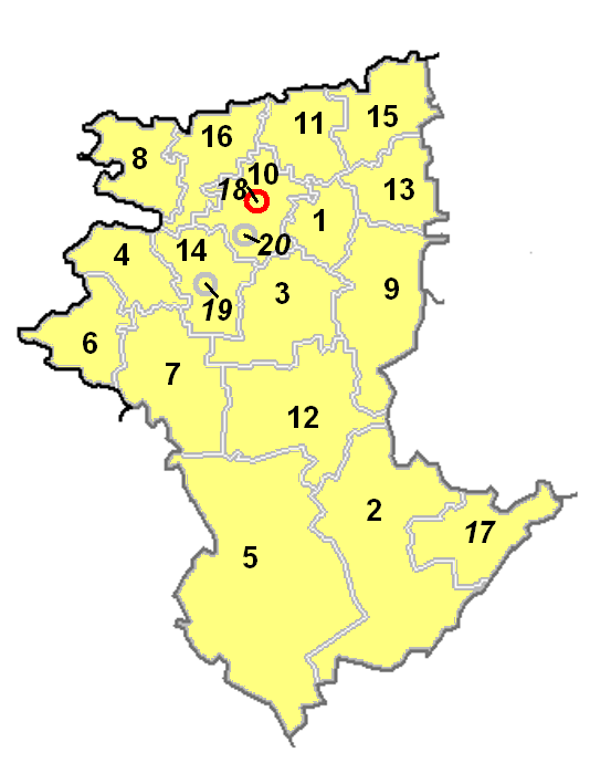 Костанайская область. Карта административно-территориального деления